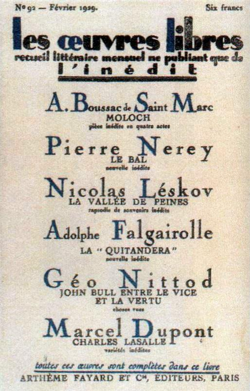 Couverture de la revue Les Œuvres libres, reproduite dans Irène Némirovsky, un destin en images, Olivier Corpet (dir.), Paris, Denoël, 2010.